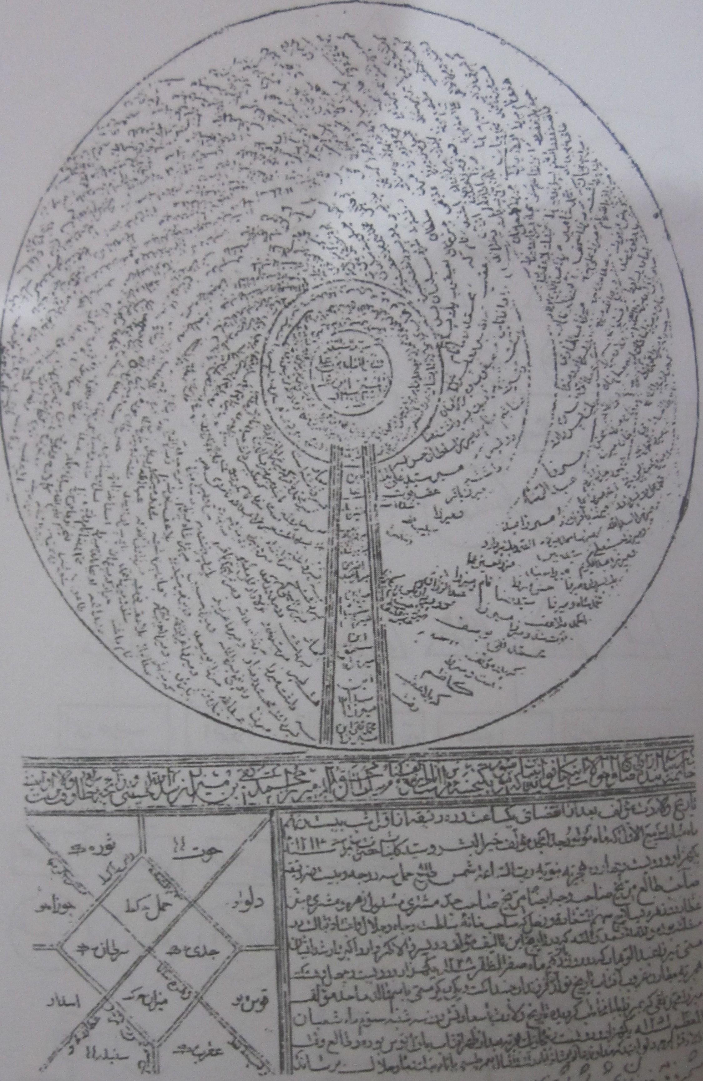 شجره‌نامه‌ای از خاندان مرعشیان شوشتر